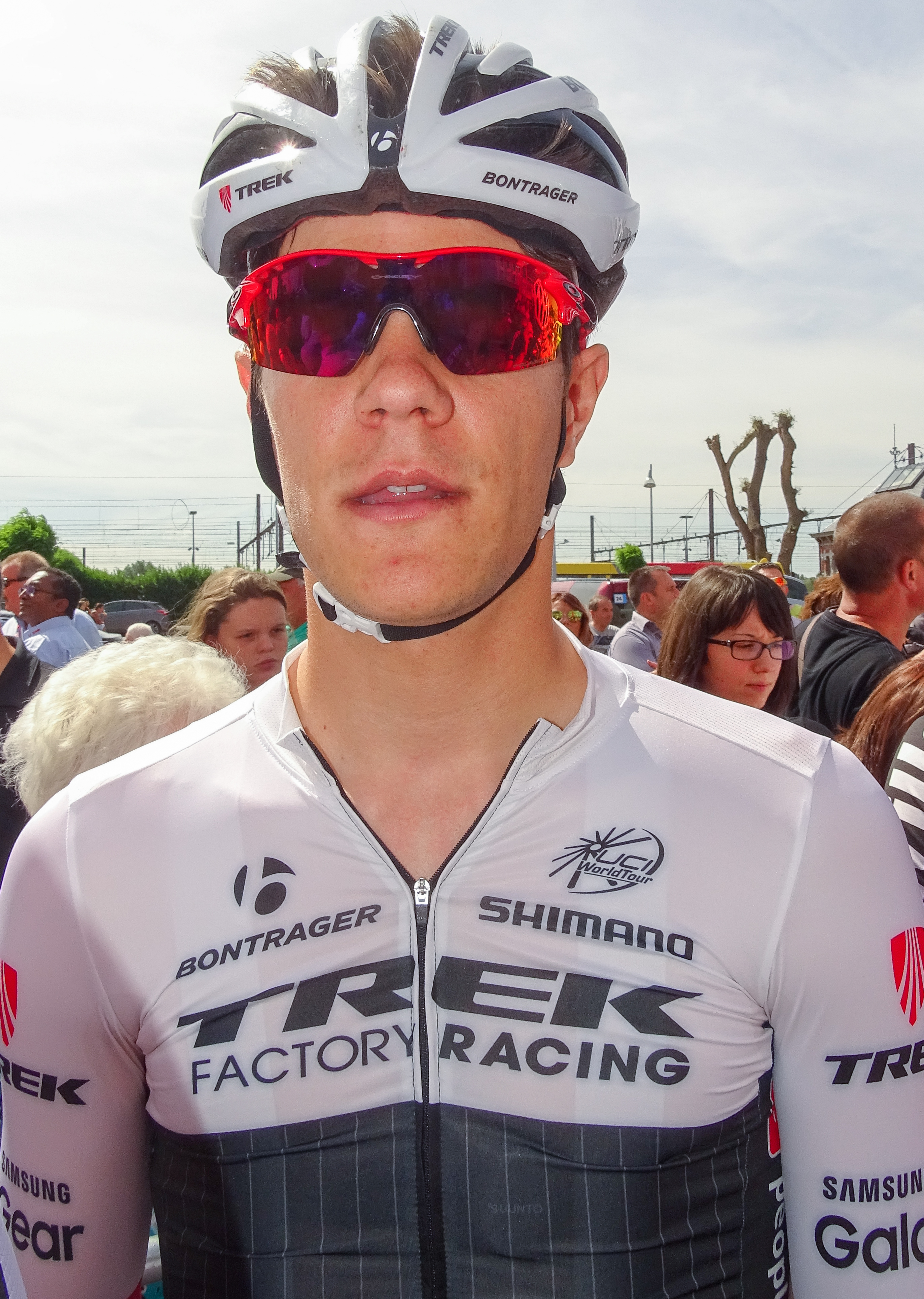 Reportage réalisé le mercredi 22 juillet à l'occasion du départ du Grand Prix Pino Cerami 2015 à Saint-Ghislain, Belgique.